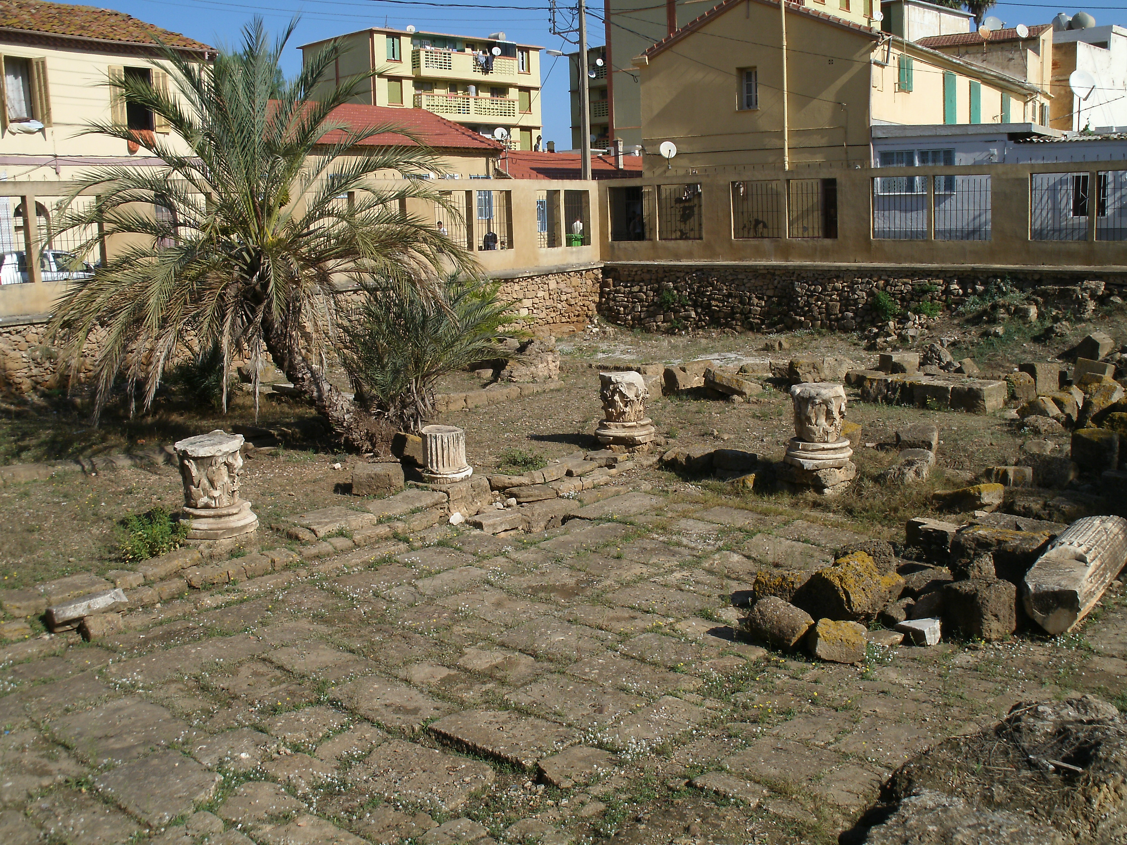 Vestiges du forum de Cesarea